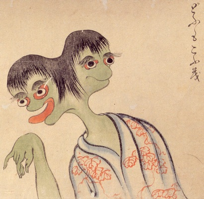 Dōmokōmo (どうもこうも) from the Hyakki Yagyō Emaki (百鬼夜行絵巻)